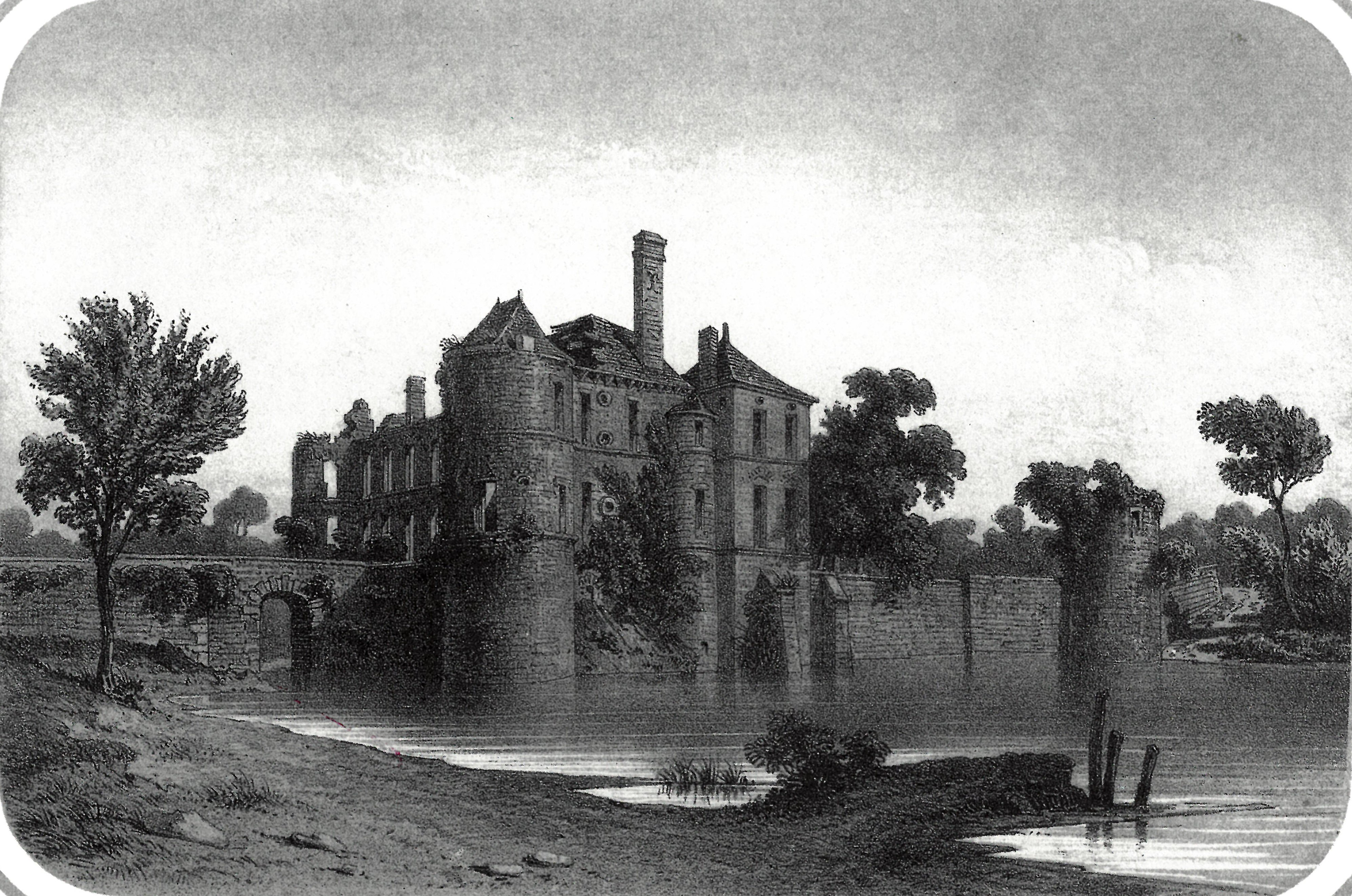 Château de Palluau